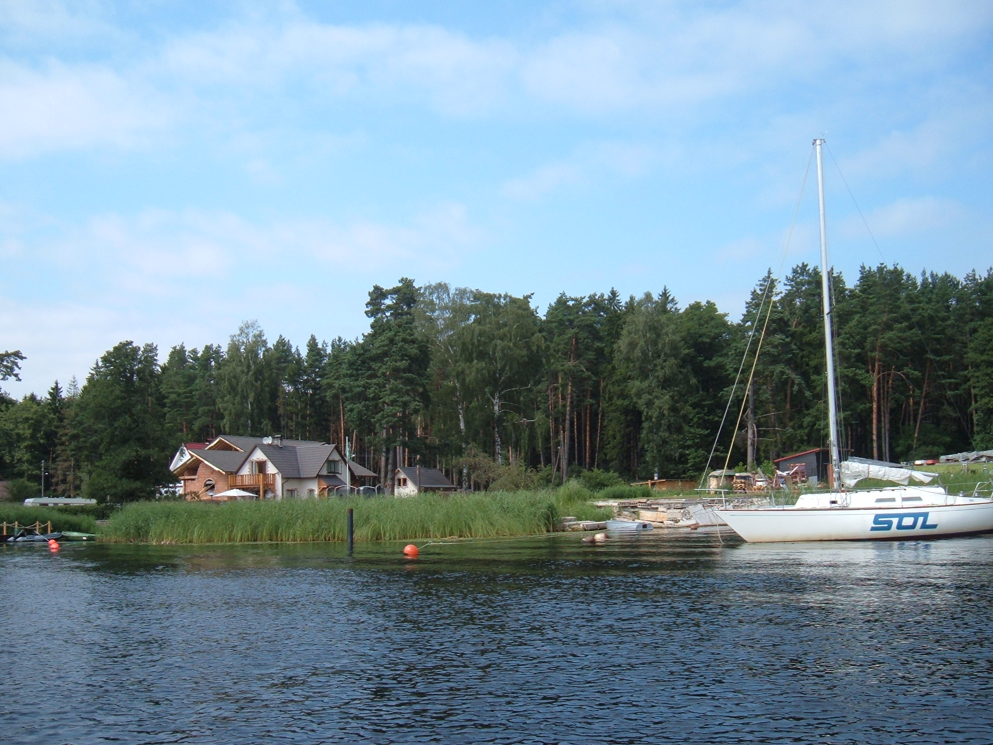 Лиелупе недалеко от устья